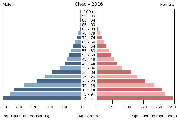 A population pyramid illustrates the age and sex structure of a country's population and may provide insights about political and social stability, as well as economic development. The population is distributed along the horizontal axis, with males shown on the left and females on the right. The male and female populations are broken down into 5-year age groups represented as horizontal bars along the vertical axis, with the youngest age groups at the bottom and the oldest at the top. The shape of the population pyramid gradually evolves over time based on fertility, mortality, and international migration trends.